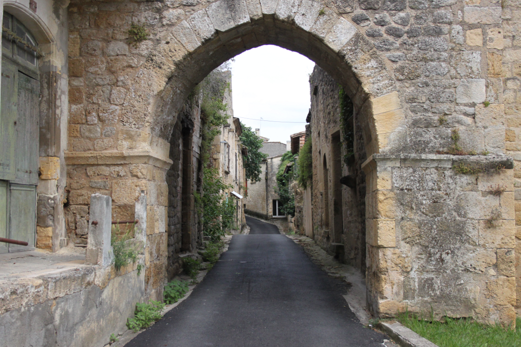 Rue Amiral Courbet, Saint-Macaire, Gironde